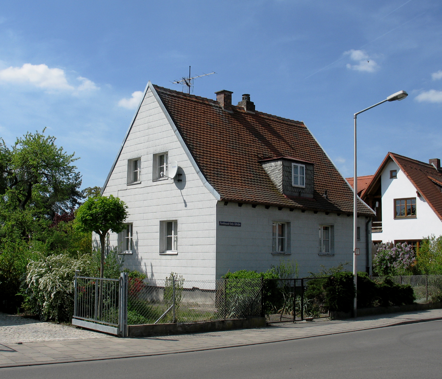 Bamberg-Gartenstadt, Kleinsiedlungshaus an der Ferdinand-Tietz-Straße (Nr. 23).